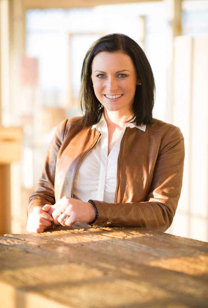 Elisabeth Köstinger, Mitglied des Europäischen Parlaments